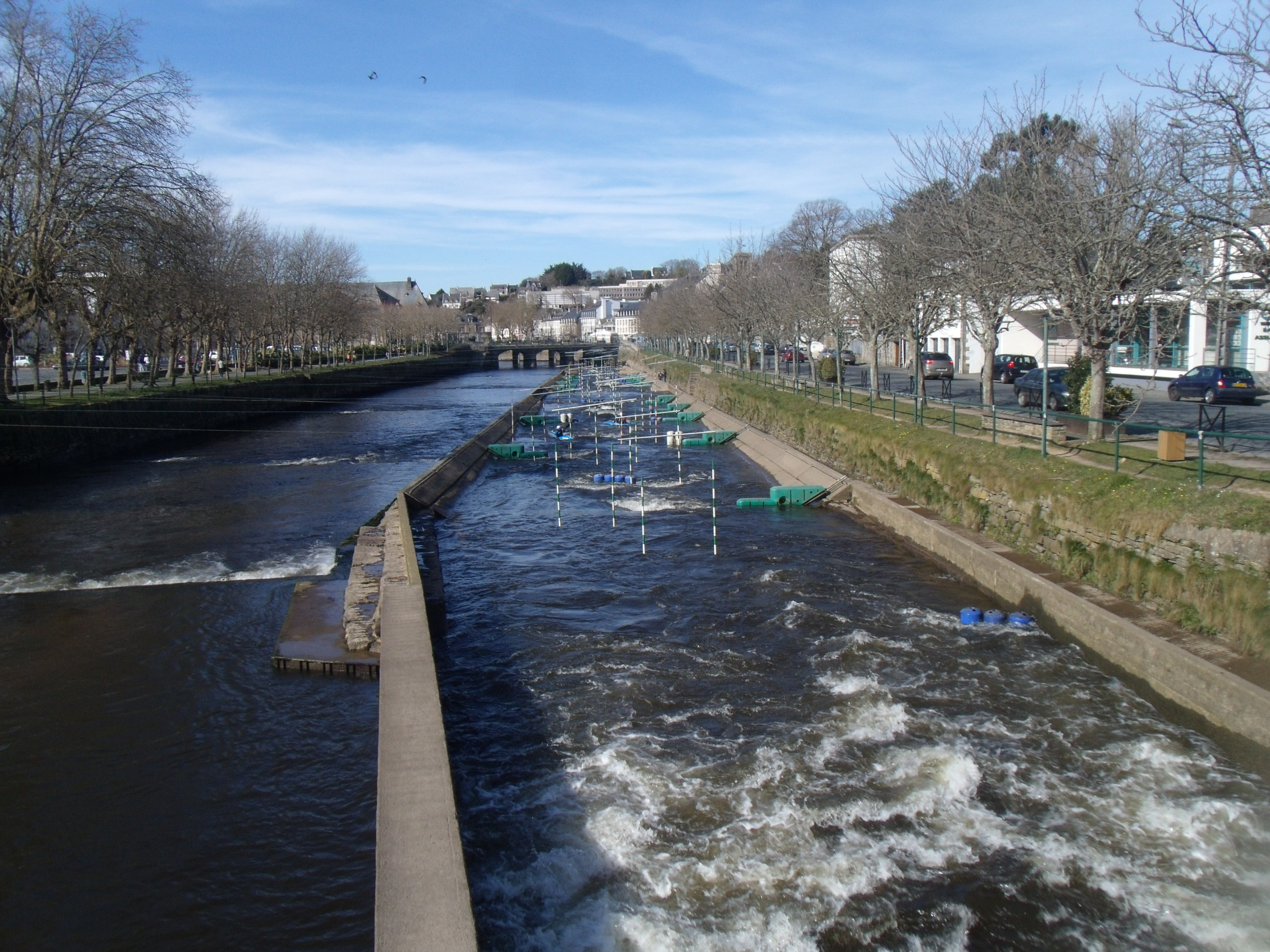 Le stade d'eau vive à Lannion; Photo prise depuis la passerelle piétons